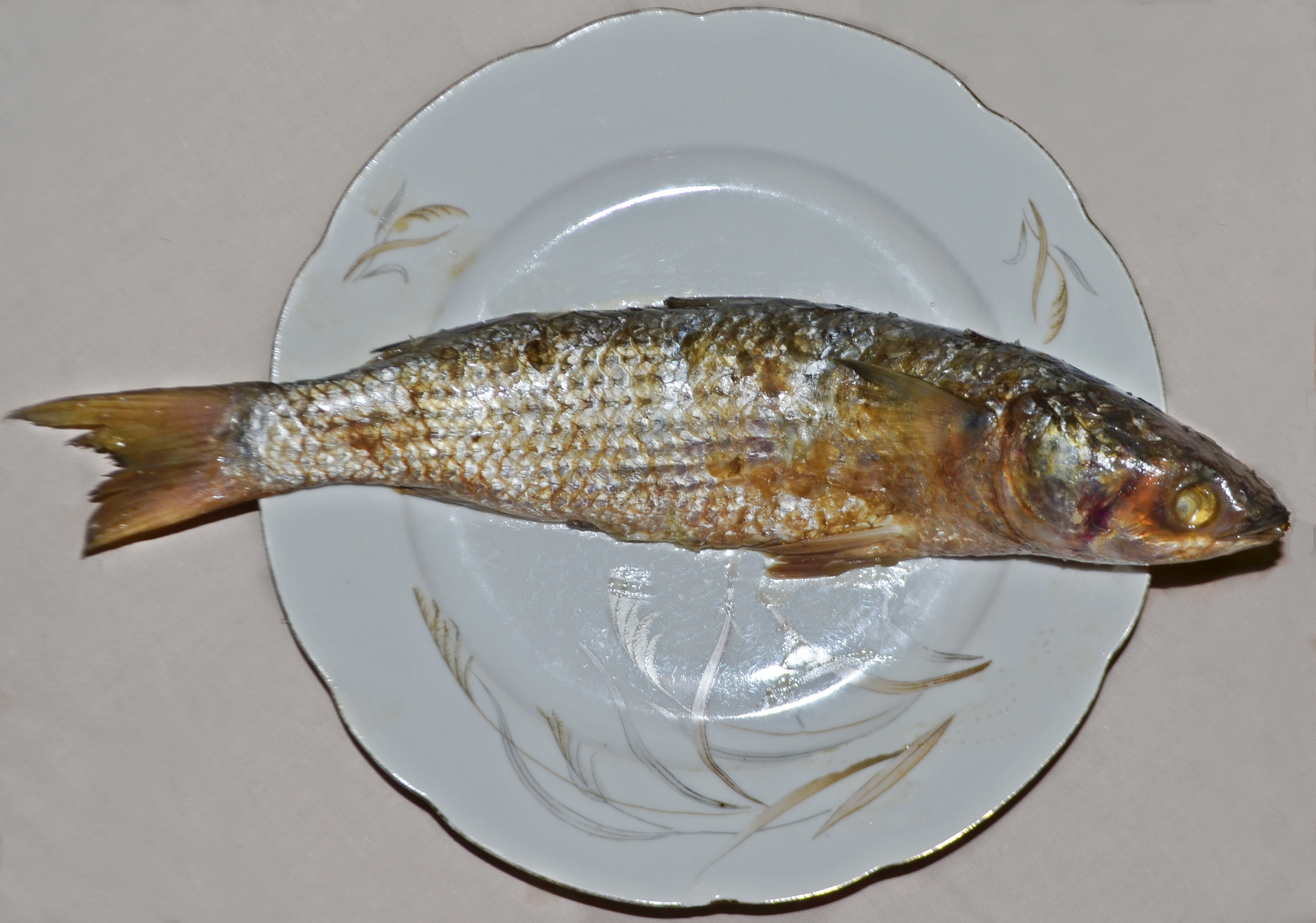 سمكة فسيخ من دسوق، مصر.